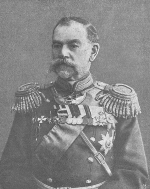 Барон Антон Егорович Зальца, русский генерал, командующий войсками Казанского военного округа.